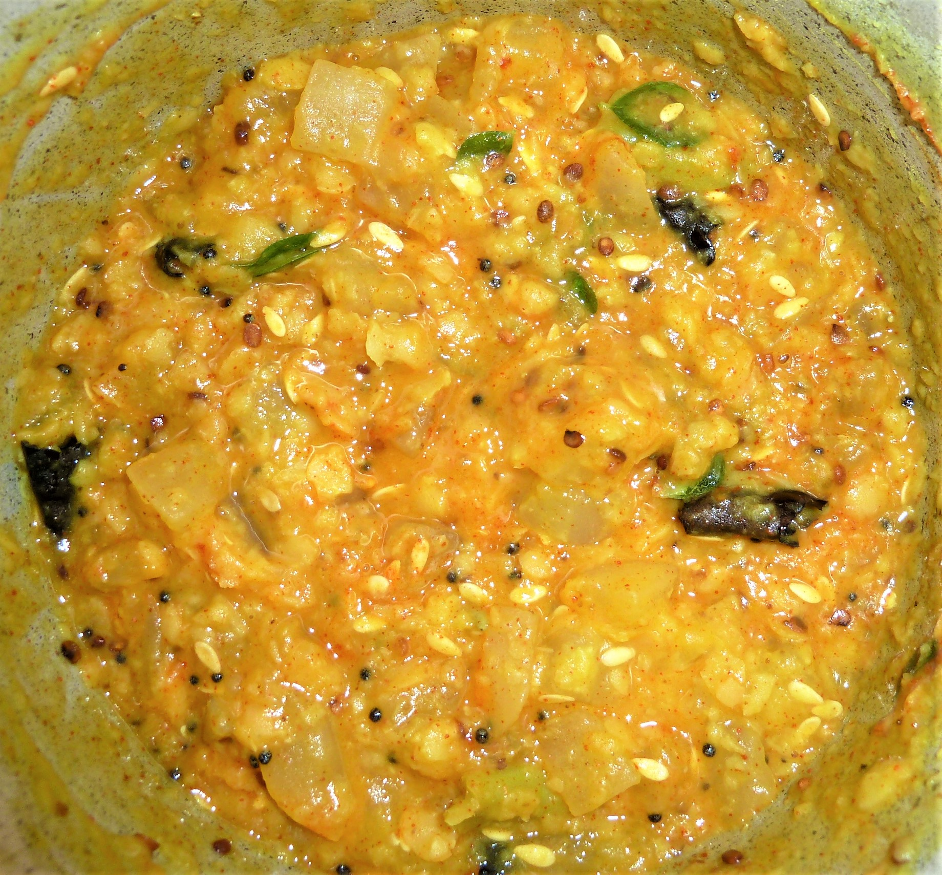 దోసకాయ పప్పు